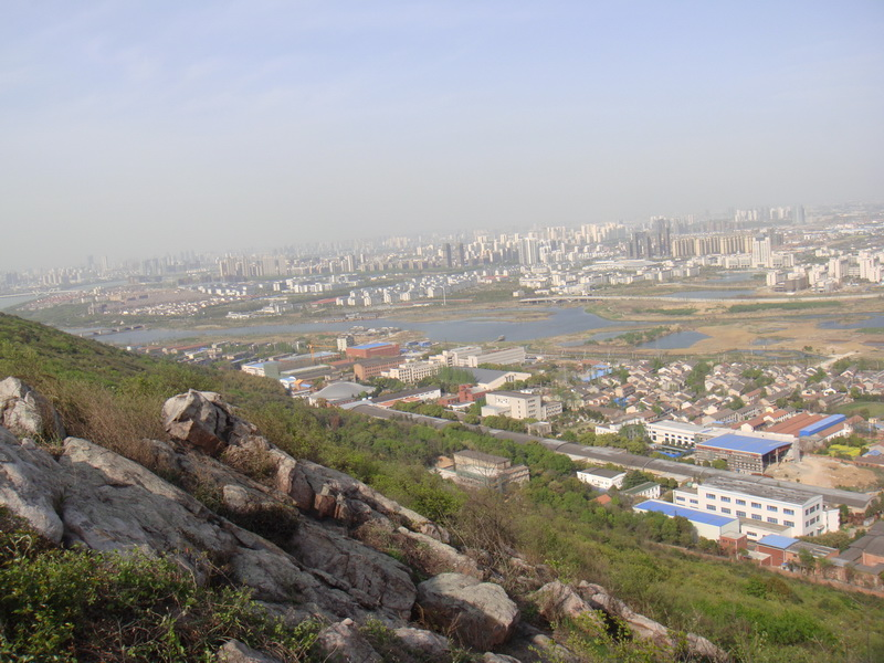 湿地